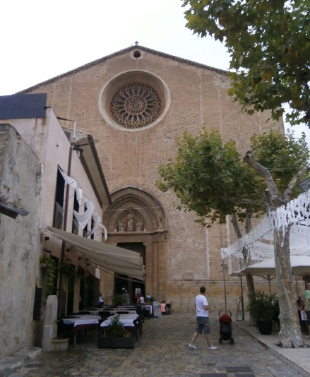 Kirche in Pollenca